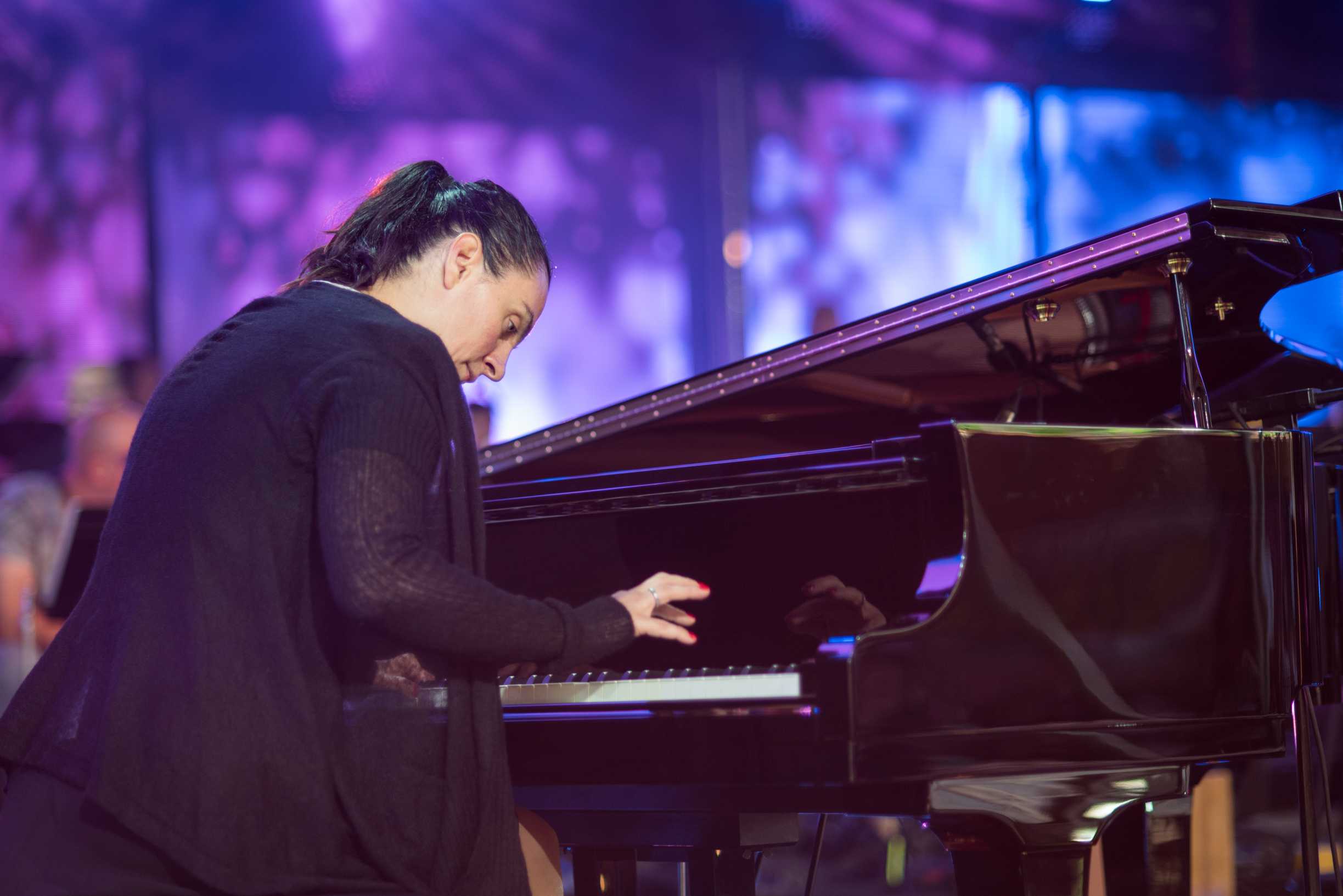 Елена Ваенга на репетиции фестиваля «Лайма. Рандеву. Юрмала 2017»